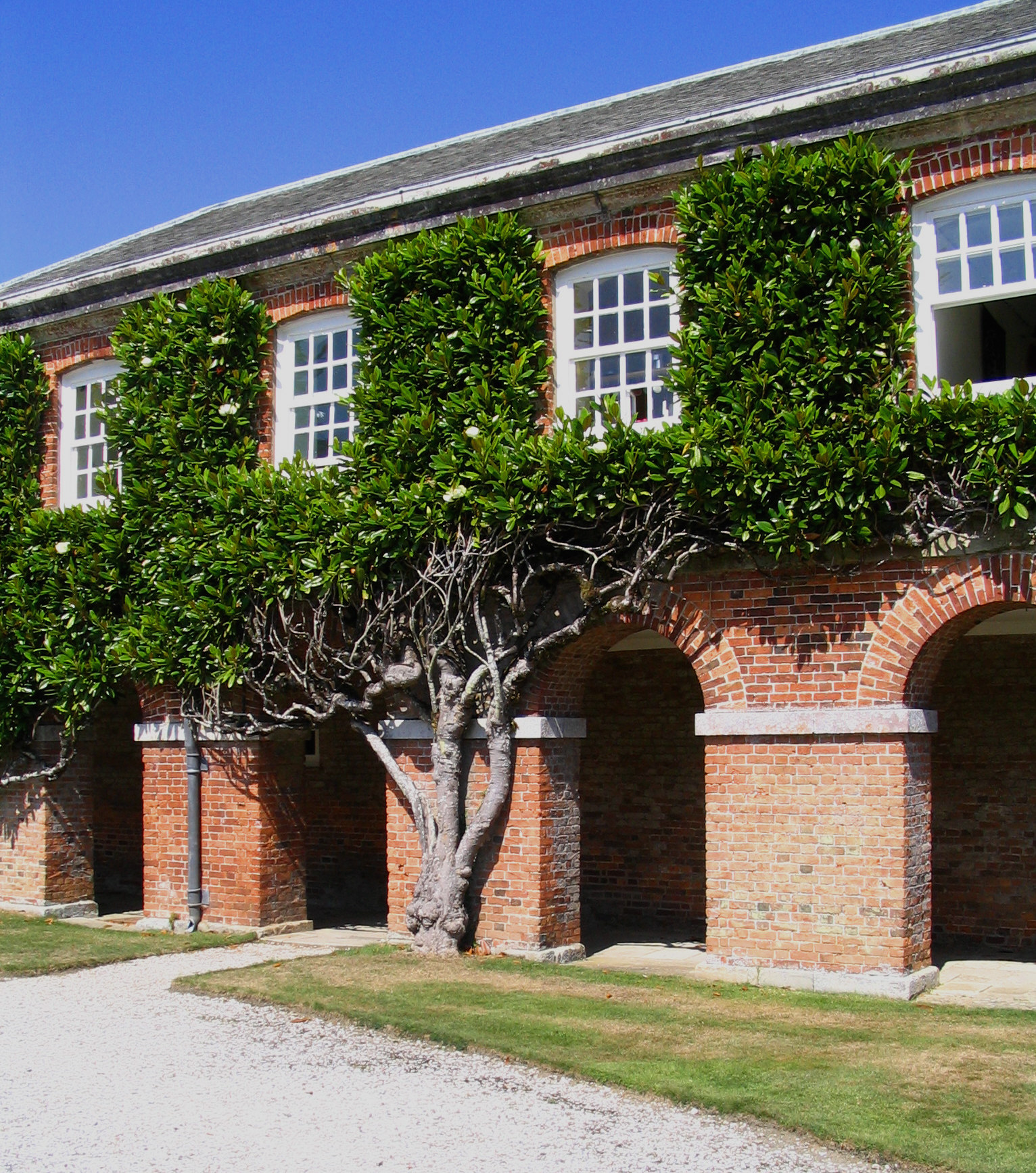 Conduite palissée d'un magnolia - Antony's house - Angleterre Auteur: P Charpiat - 2006